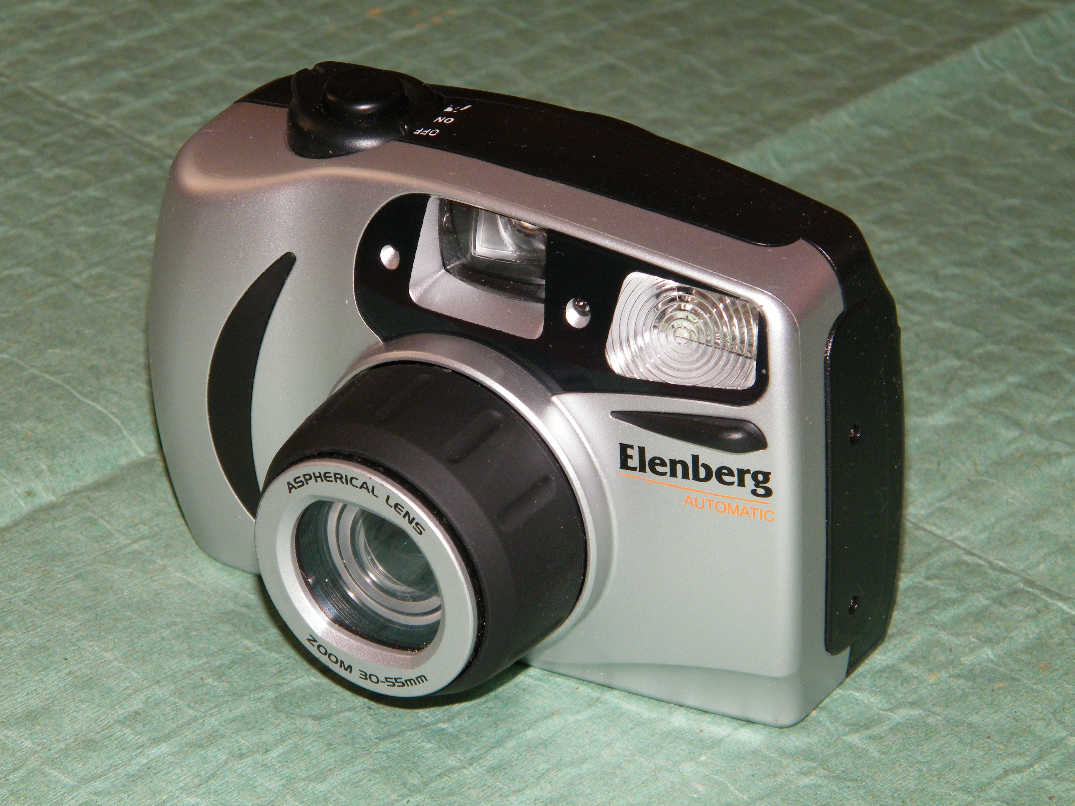 Фотоаппарат "Elenberg 501AZ" (Китай). Выпускается по заказу торговой сети "Эльдорадо", Россия.